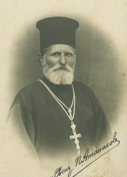 Портретна снимка на свещеник Павел Атанасов в с. Ези бей (Паскалево), Добричко.